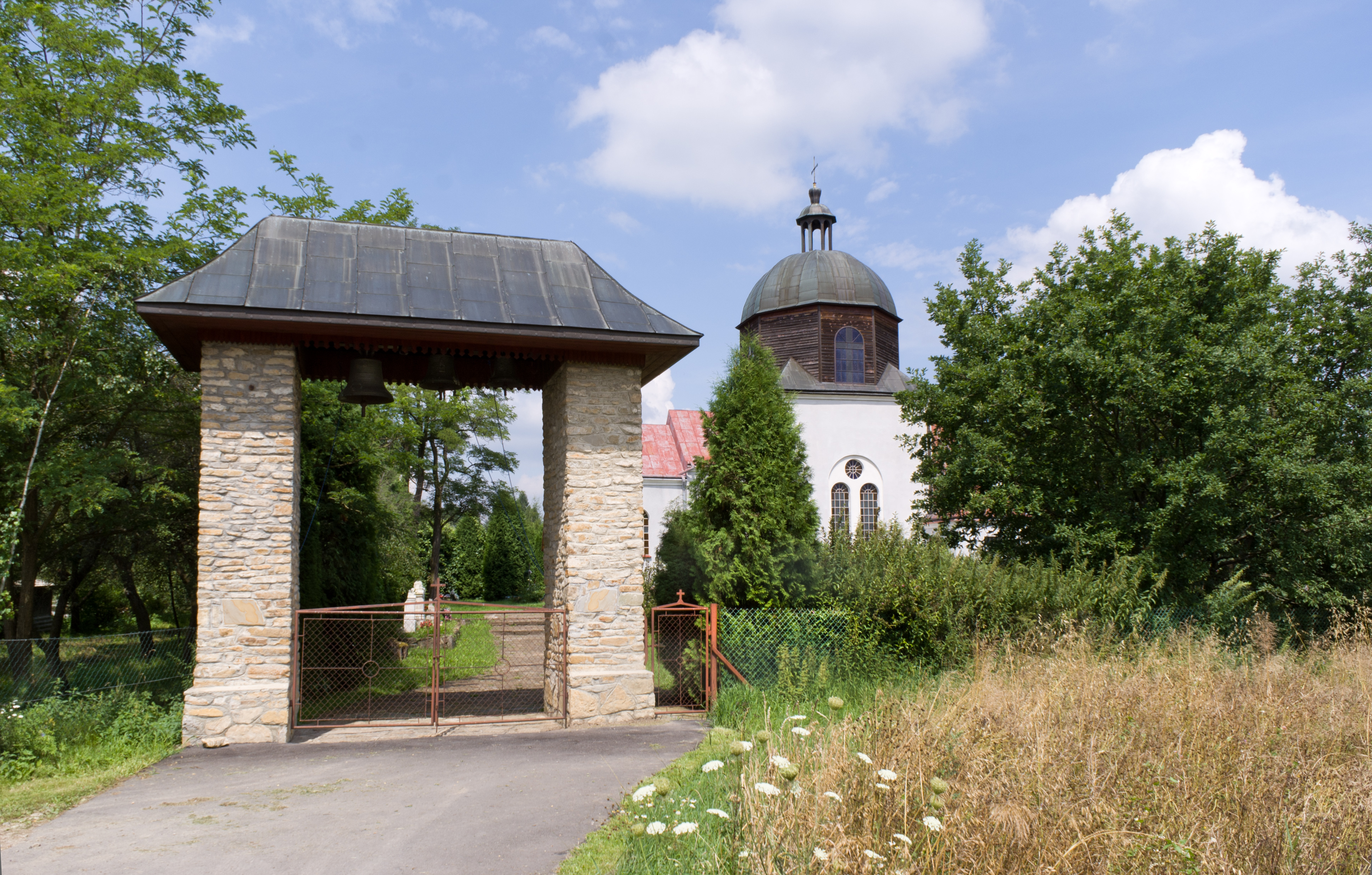 Cerkiew Cudu św. Michała Archanioła w Chołowicach.